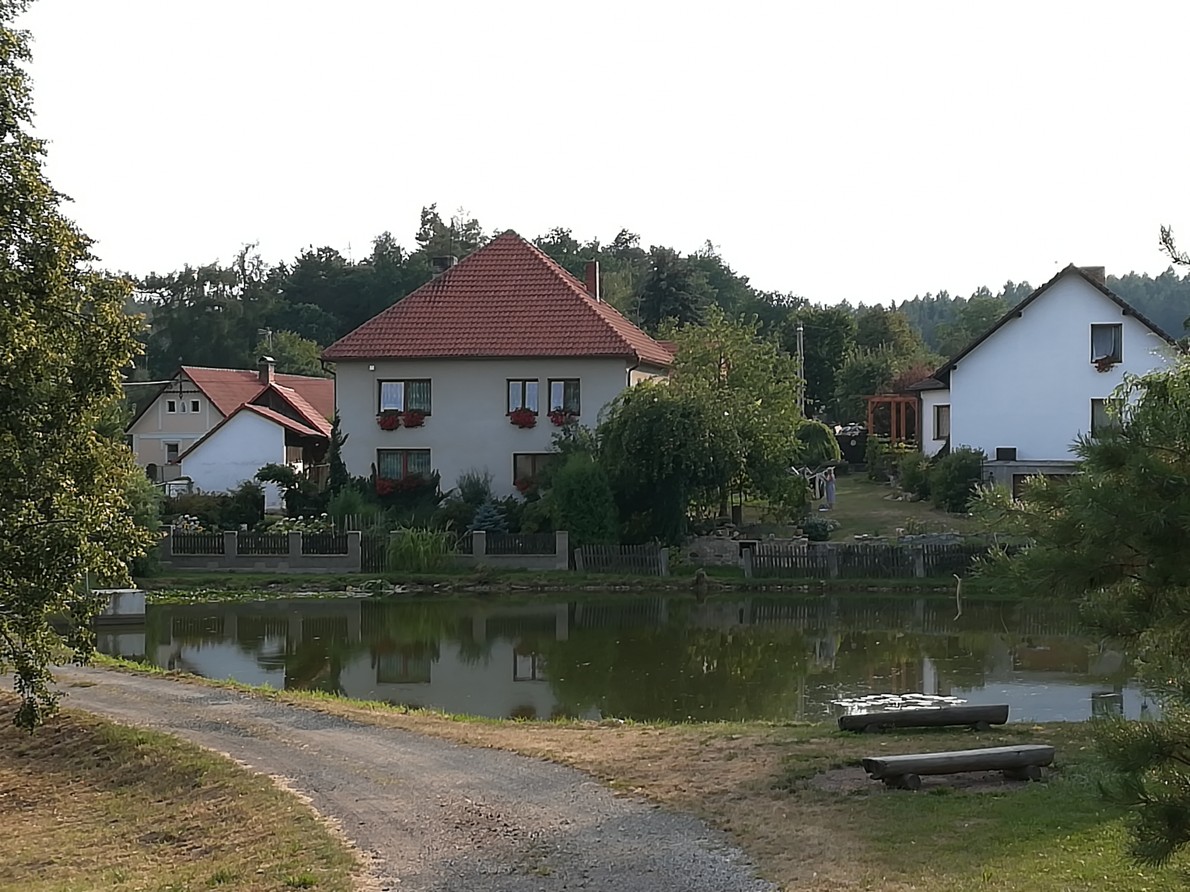 Chobot, ZSJ v rámci vesnice Nesperská Lhota, části města Vlašim